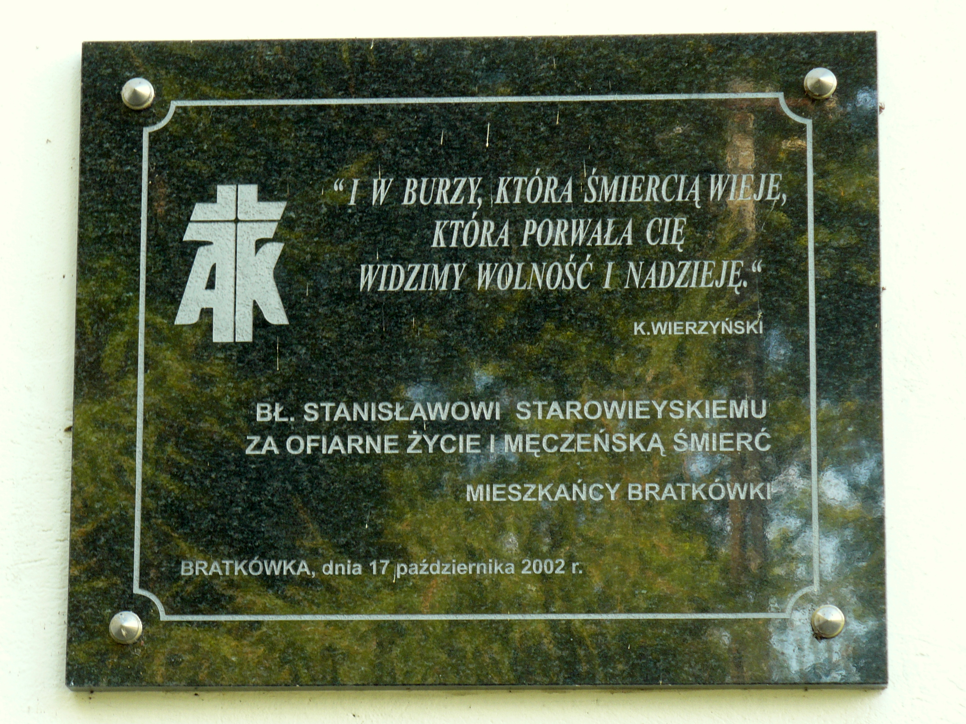 Tablica pamiątkowa umieszczona na ścianie wejściowej do Dworu.